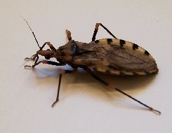 especie: Panstrongylus geniculatus autor: Fernando Otálora Luna localidad: Montebello, Amalfi Municipality, Departmento de Antioquia, Colombia (6°55’58’’N; 75°05’30’’ W, 18-24 °C).